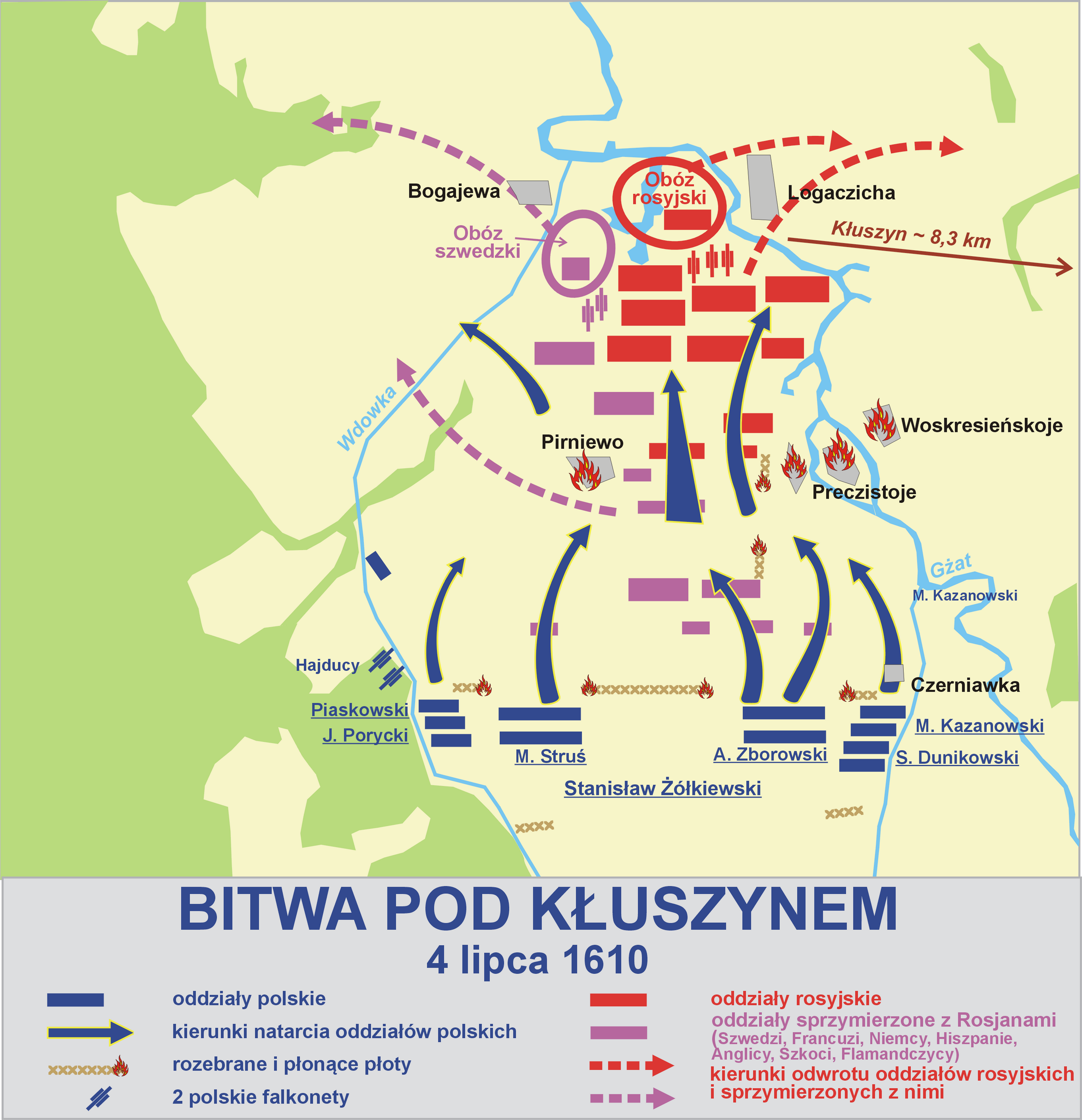 Bitwa pod Kłuszynem (04-07-1610)